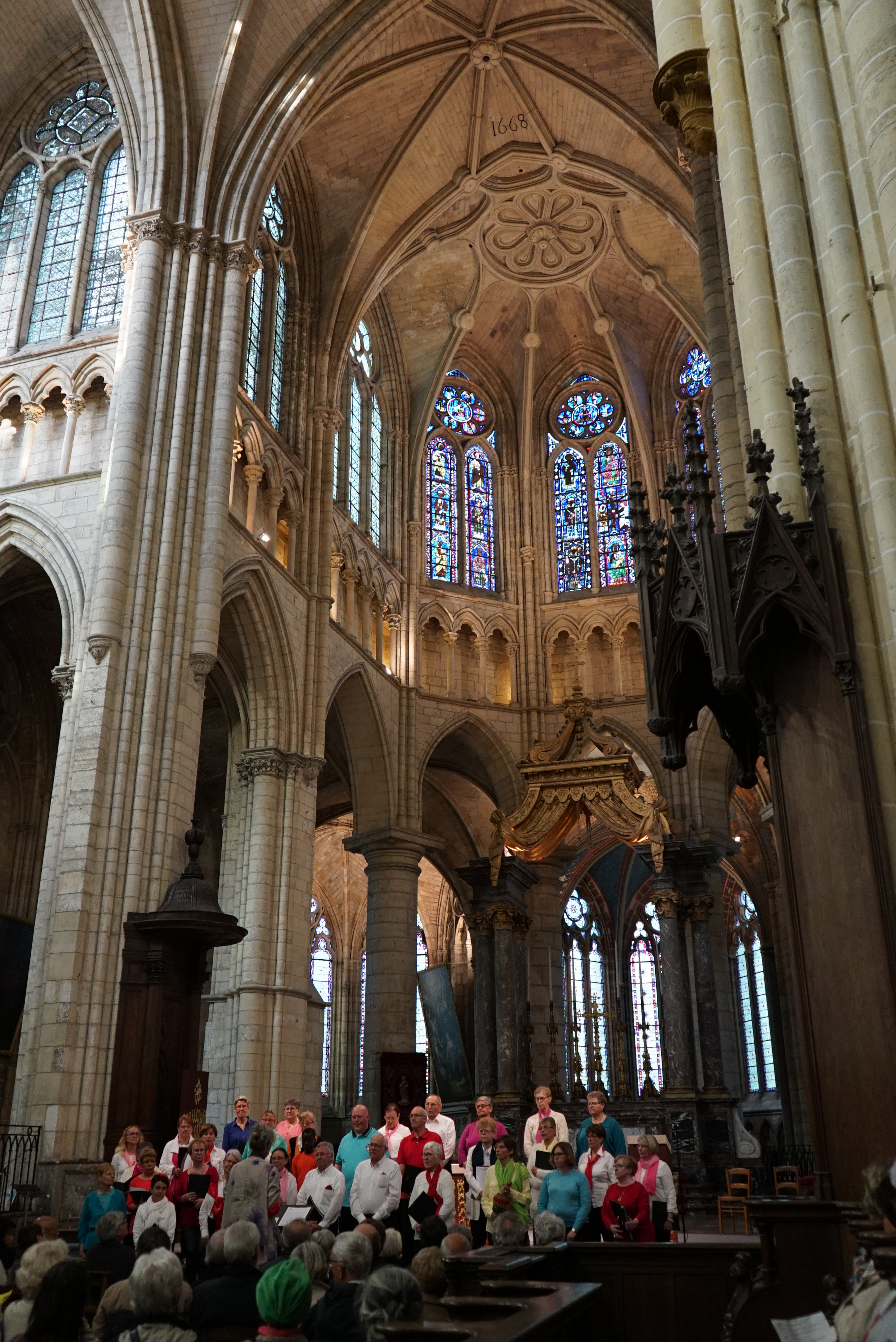 lors de la Nuit européenne des musées 2016 à Châlons-en-Champagne.